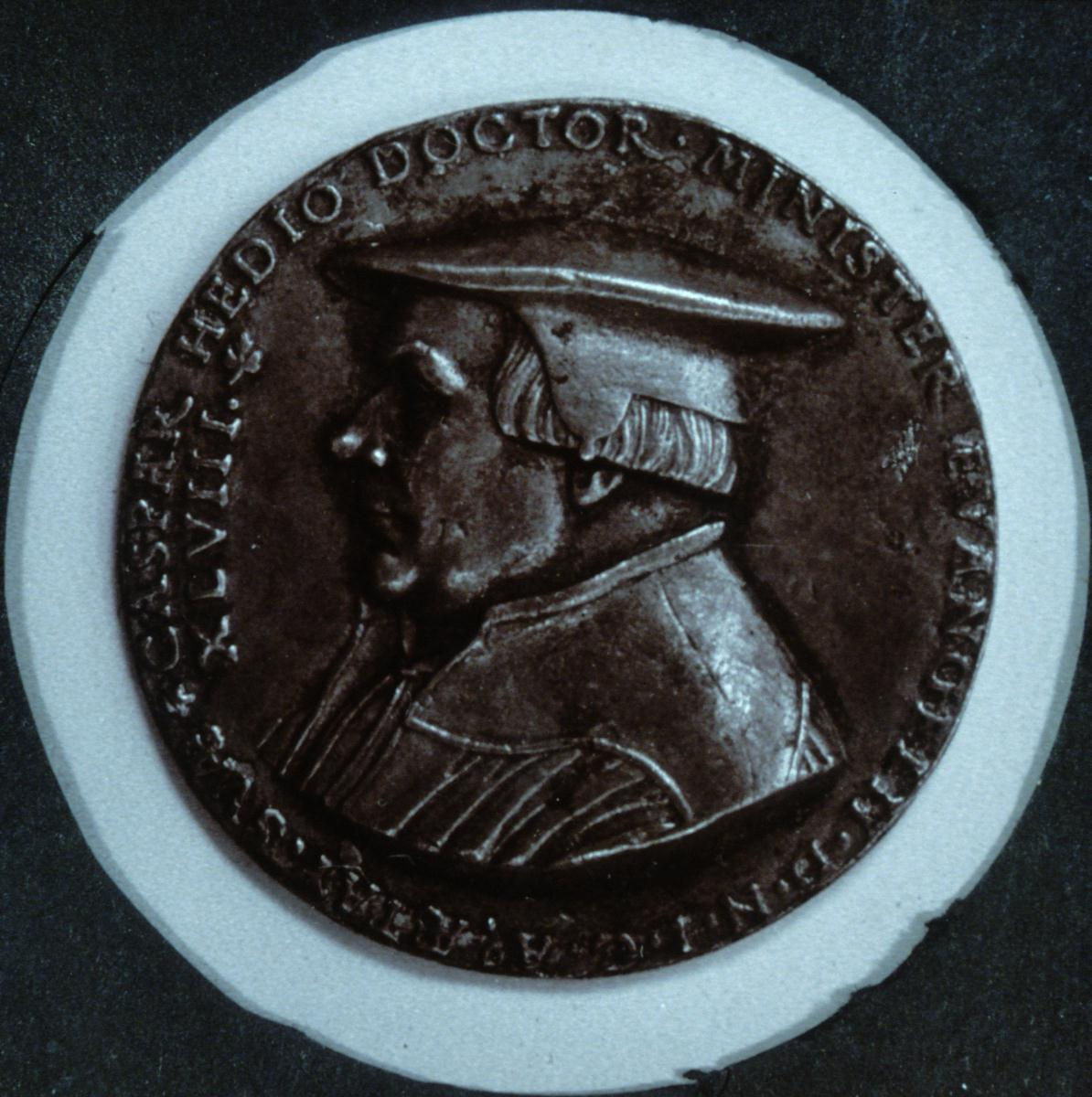 Médaille représentant Caspar Hedio datant de 1543. Cette médaille est le seul indice permettant d'établir la date de naissance d'Hedio. Collection BNUS